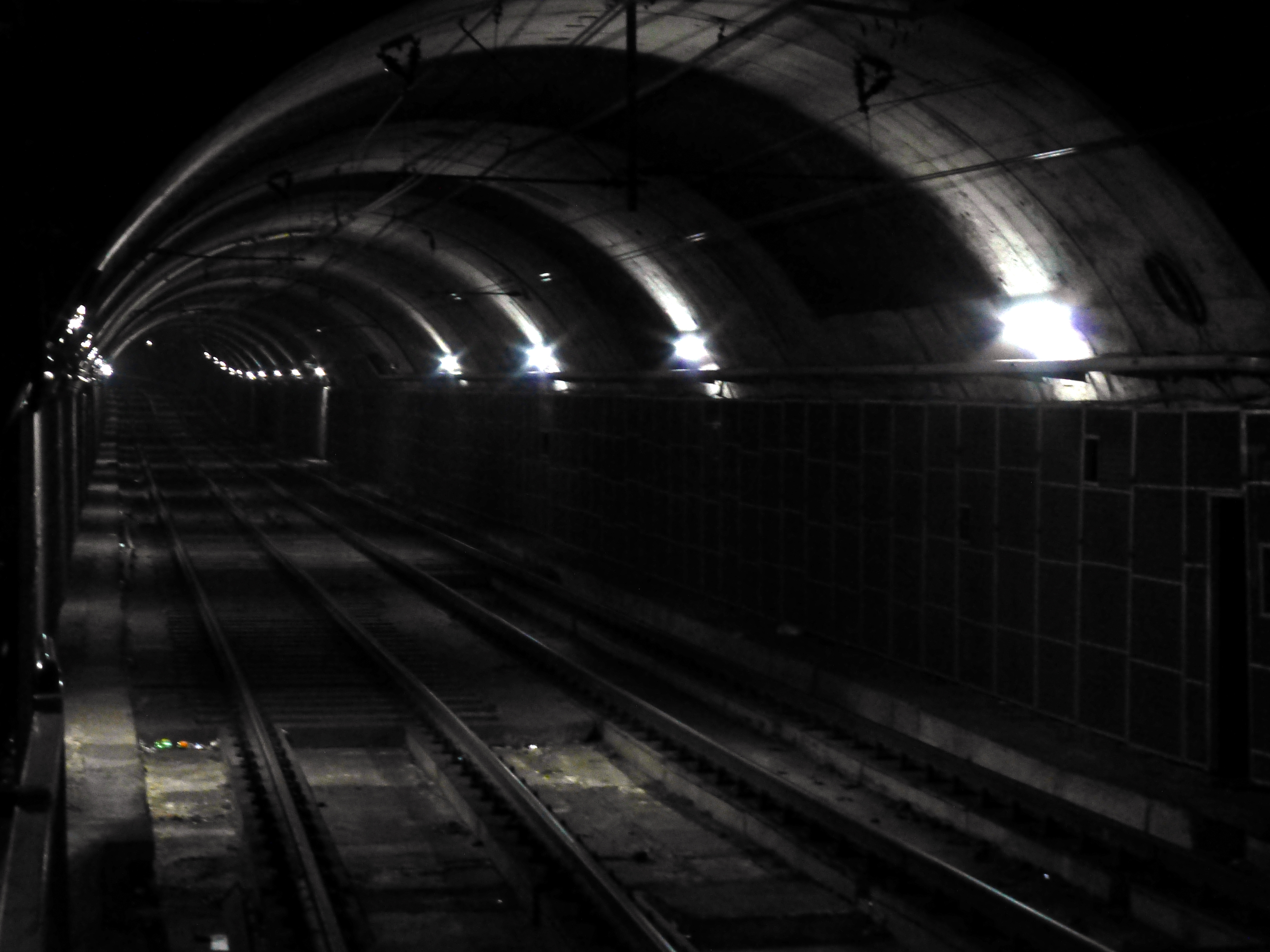 Túnel del subte de Buenos Aires. Imagen tomada en la estación Juramento de la Línea D.